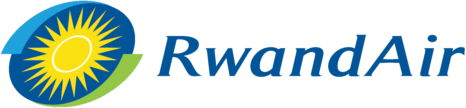 Logotype de la compagnie aérienne nationale rwandaise.